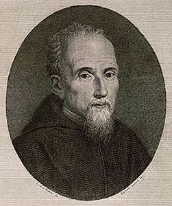 Paolo Sarpi, engraving